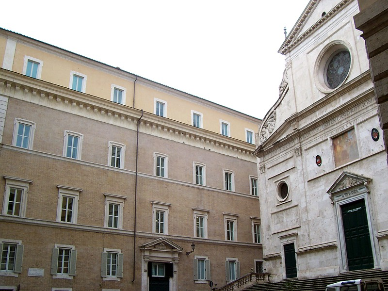 Roma - Piazza S. Agostino con la Chiesa omonima